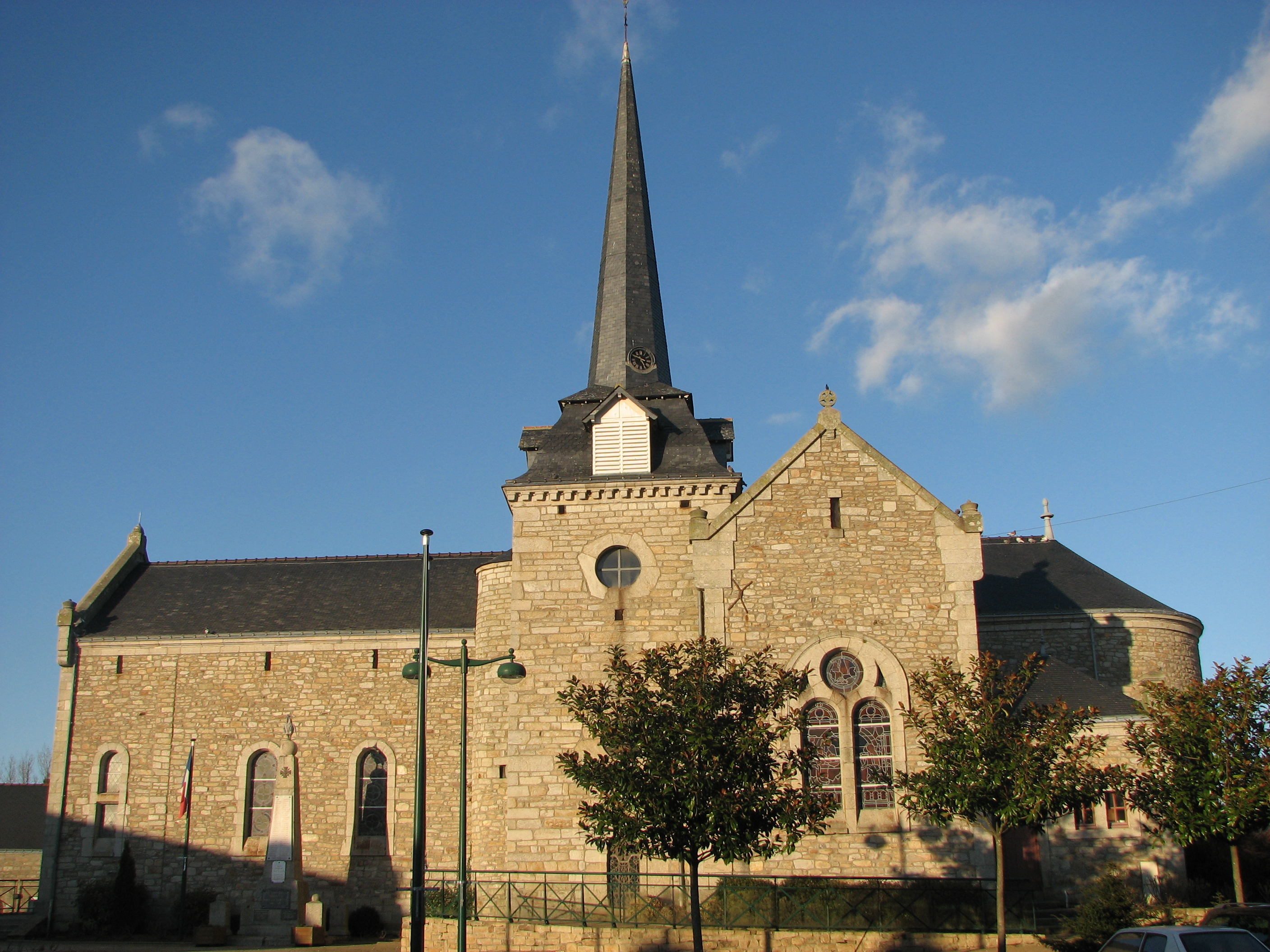 Église de Treffléan (Morbihan).